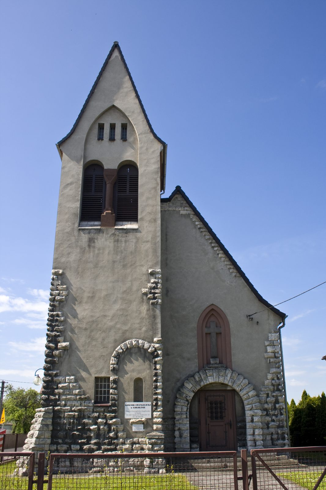 Kościół ewangelicki w Gogolinie